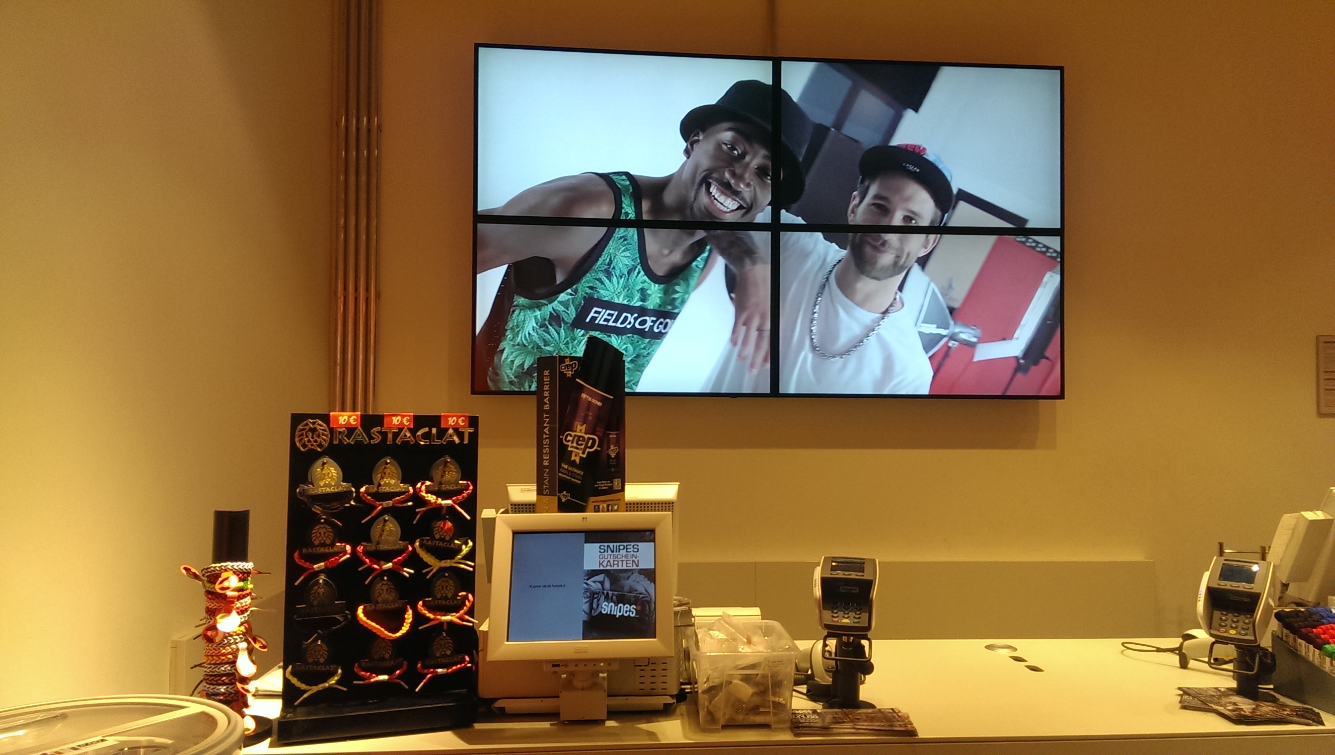 Digital Signage im Handel - snipes nutzt Werbebildschirme in seinen Filialen. Köln, Deutschland